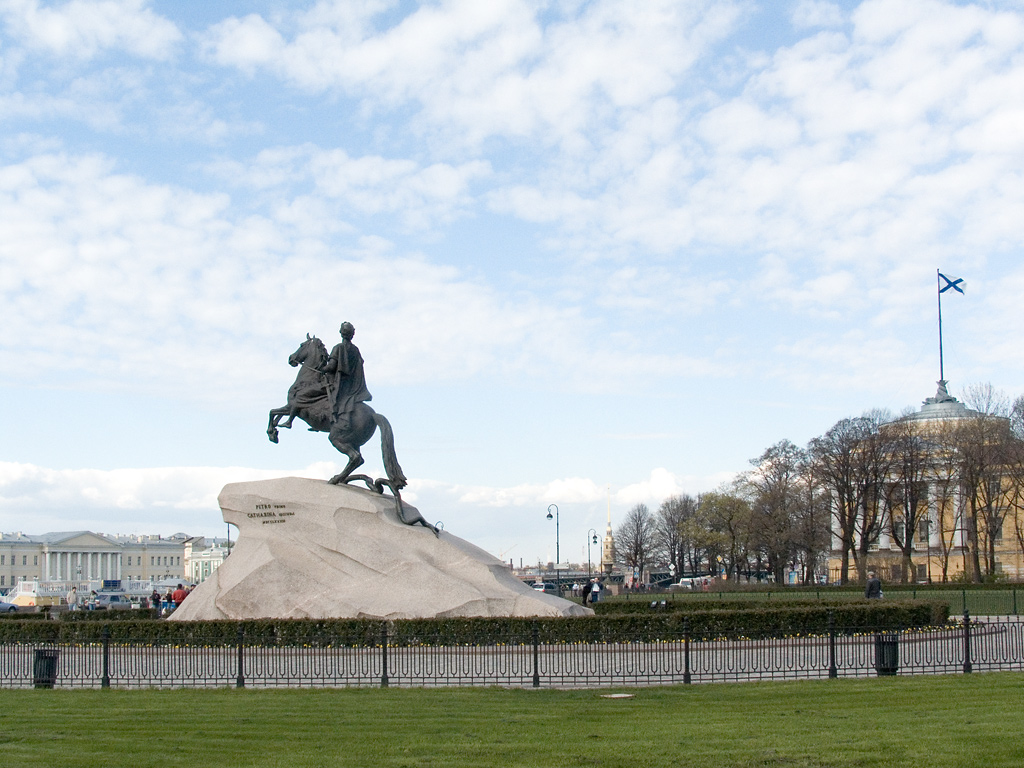 Bronze Horseman in Sankt Petersburg